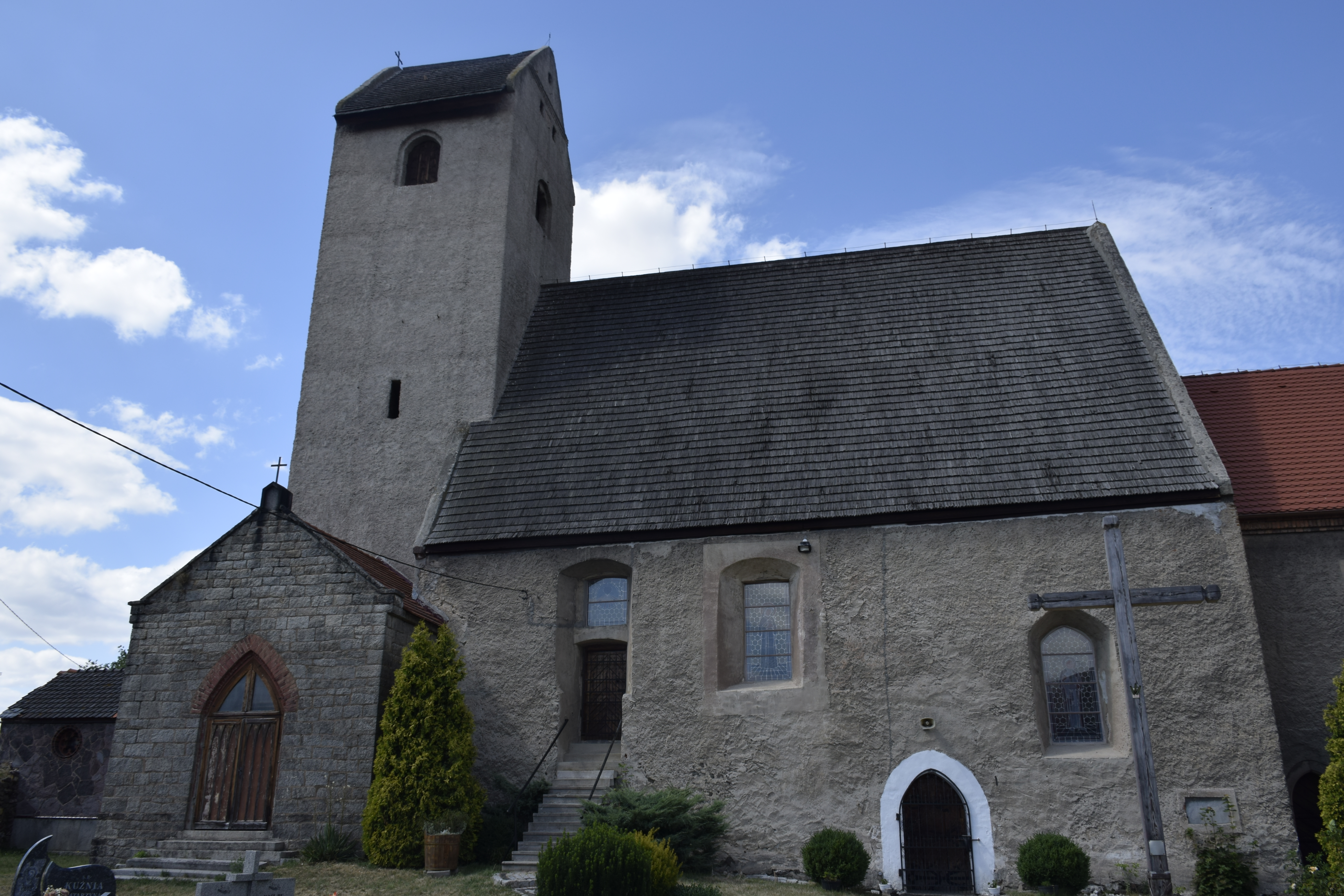 Wiadrów. Polska.